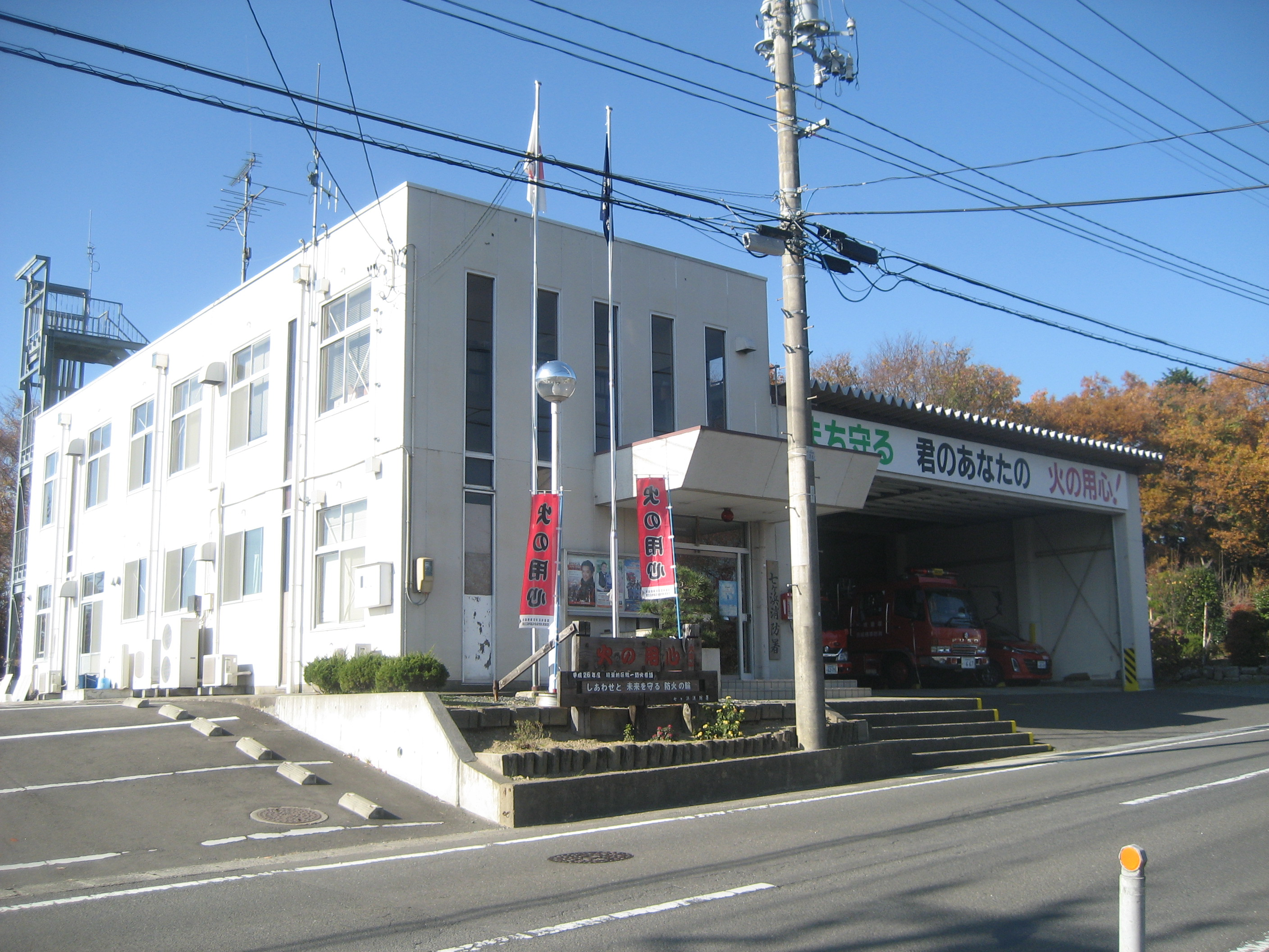 塩釜地区消防事務組合七ヶ浜消防署庁舎